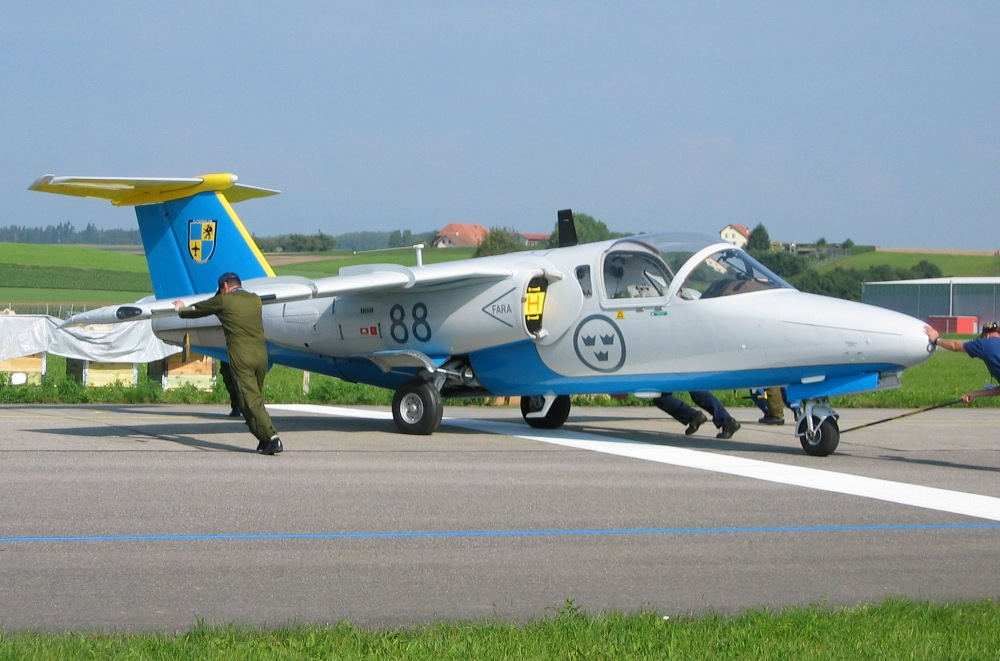 Saab 105 aufgenommen in Payerne